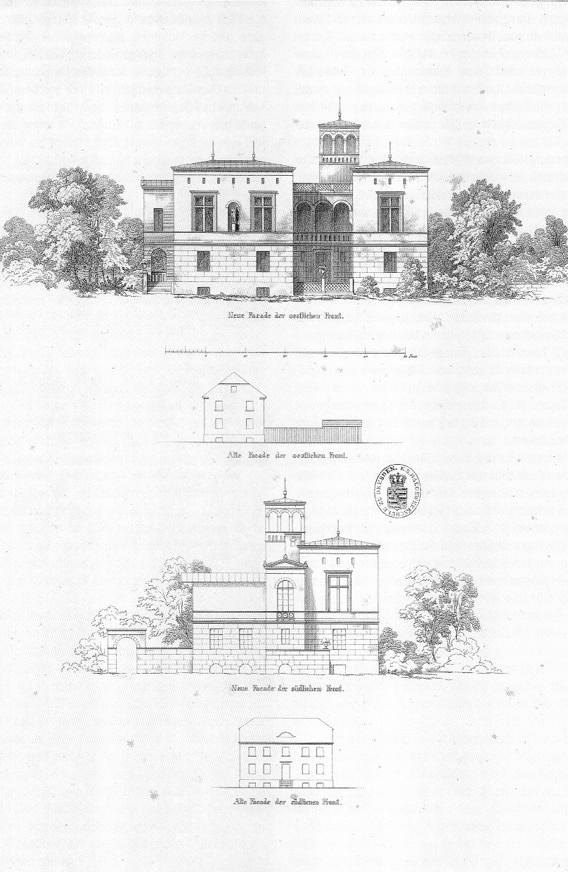 Front Villa Schöningen, Potsdam, Germany